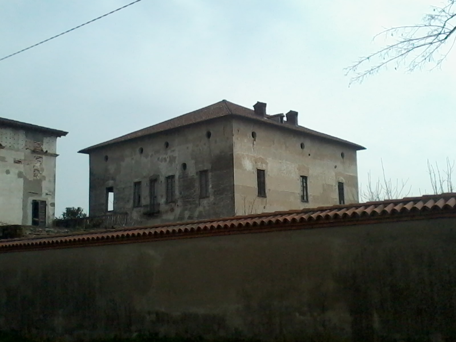 Il Palazzo Doria Borromeo Medici a Fagnano, Gaggiano (MI) - Italy